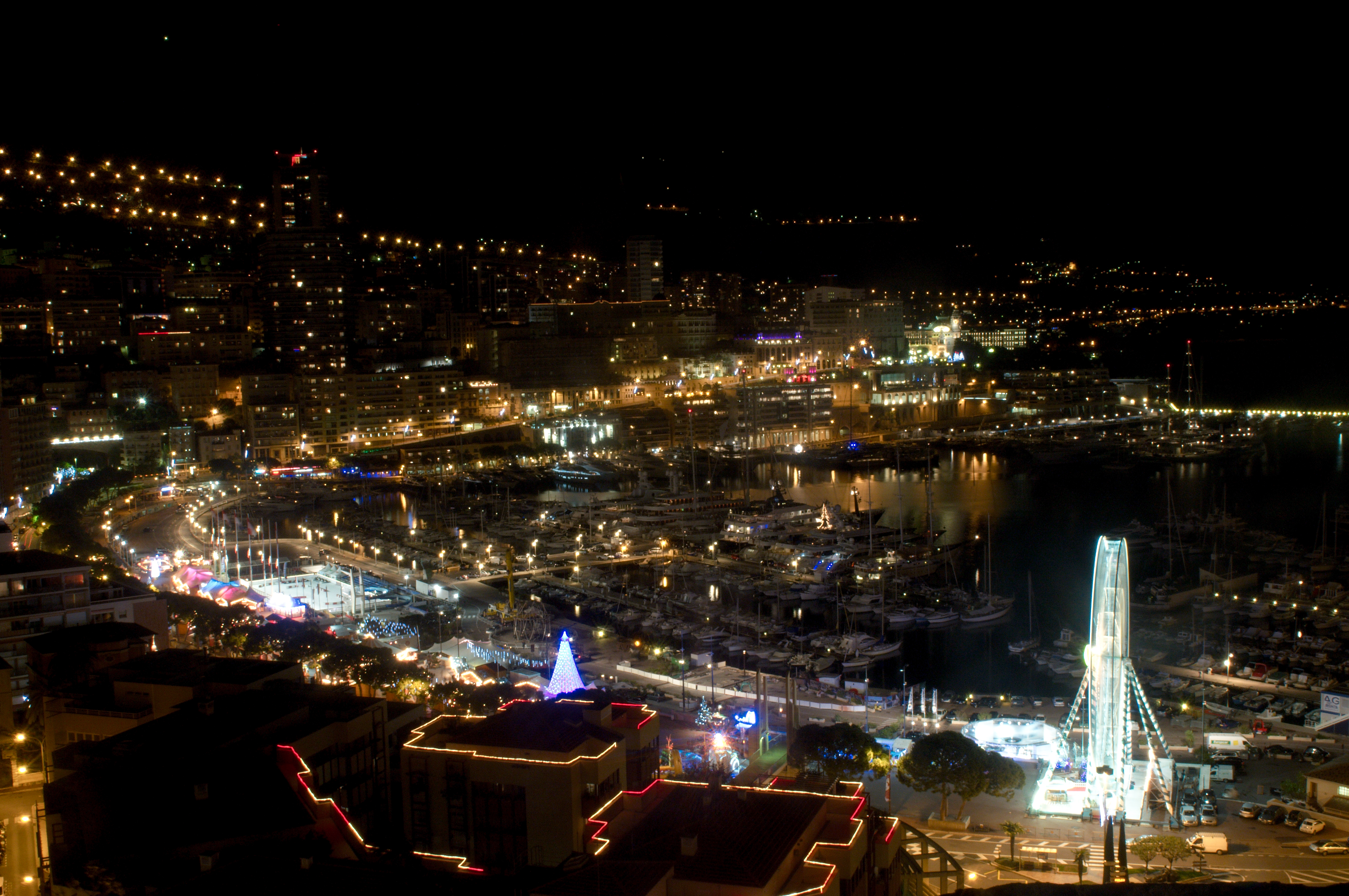 Port Hercule en décembre